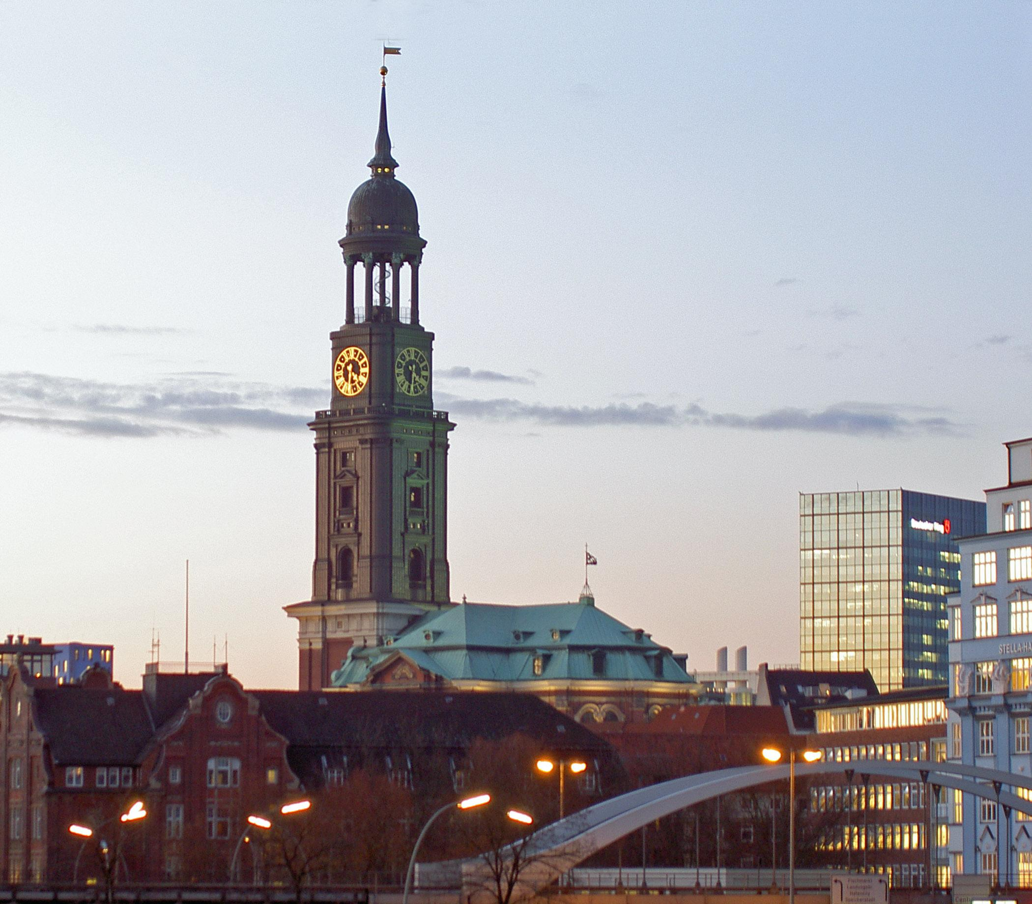 St. Michaelis Church, Hamburg